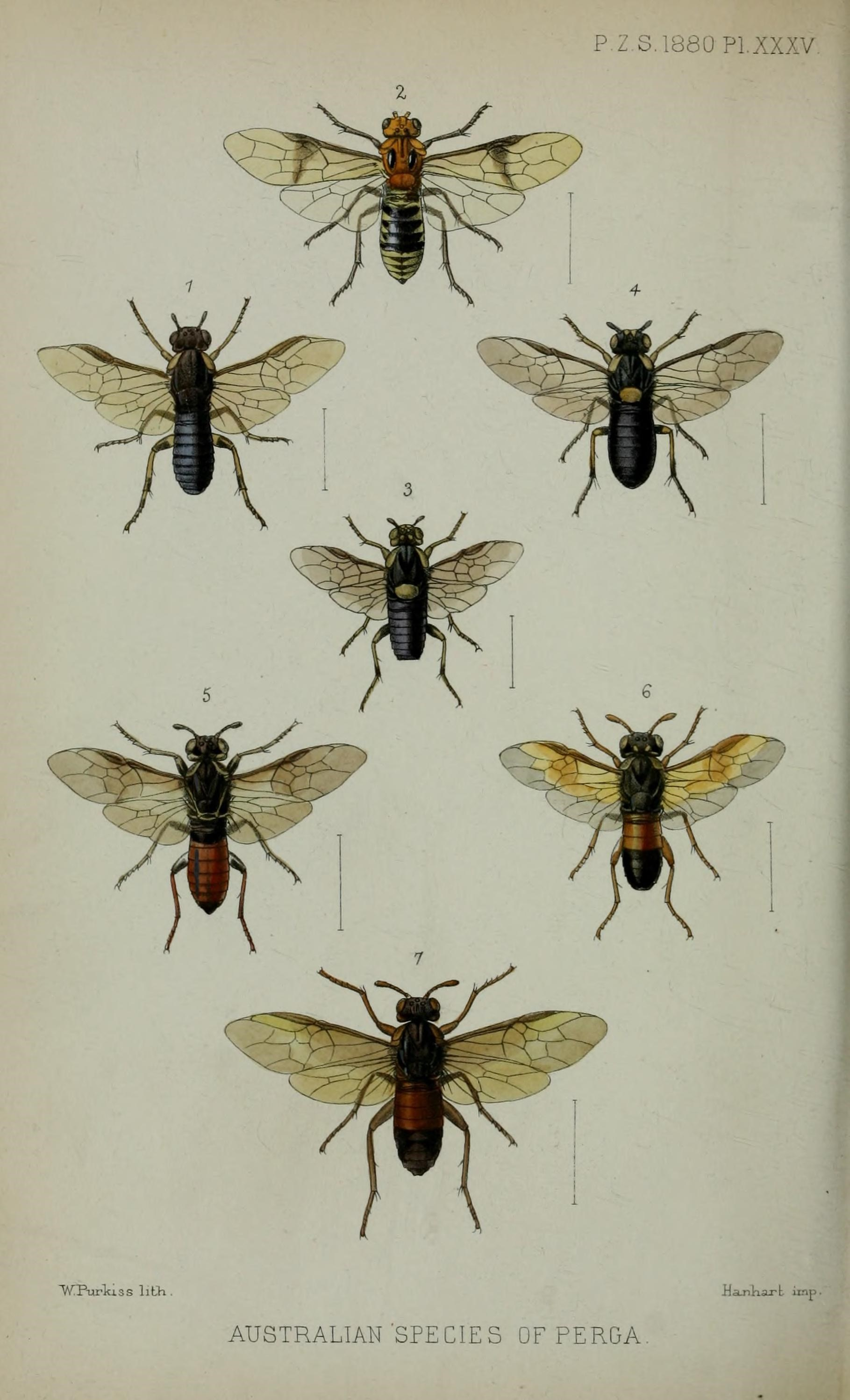 P.L. S.iyBUPl.xxxv. "W^Pui'lciSS liLh . HajiKart iinp. AUSTRALIAN SPECIES OF PERGA